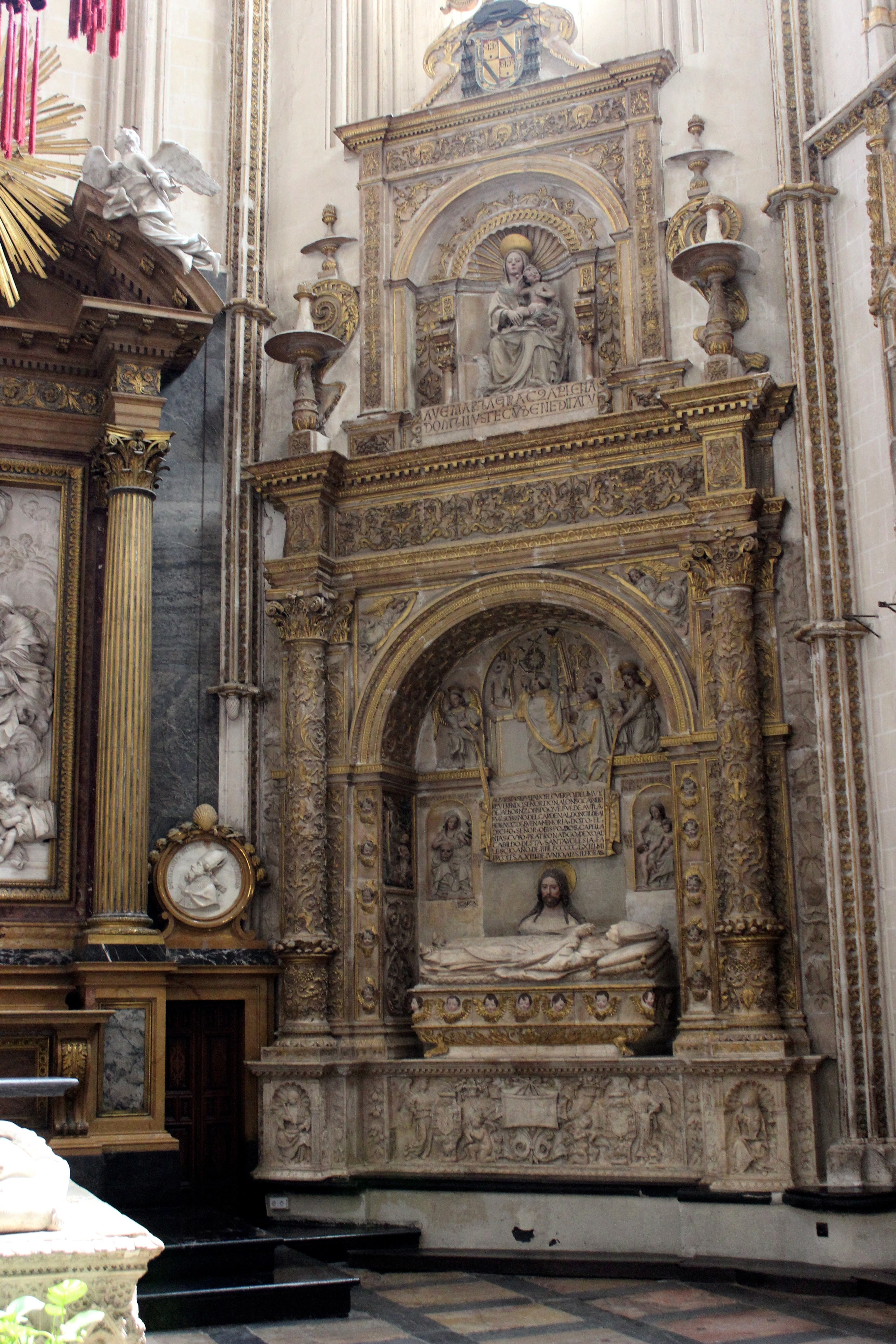 Capilla de san Ildefonso, catedral de Toledo.